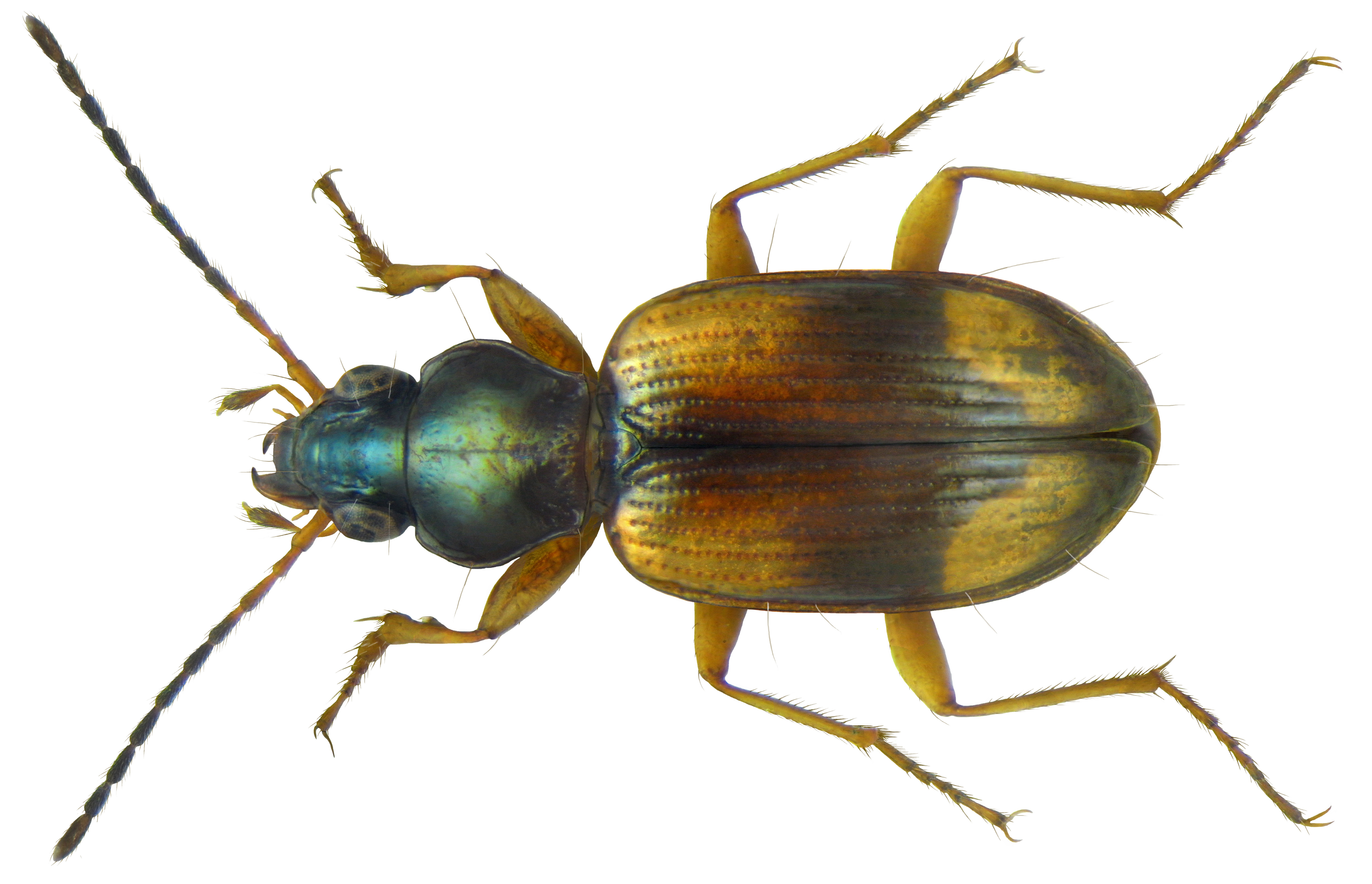 Familie: Carabidae Groesse: 4,9-6,3 m Verbreitung: Westpalaearktis, bis Kleinasien, in Nordamerika eingeschleppt Ökologie: an Ufern von Gewässern Fundort: Germania, Bayern, Oberfranken, Kulmbach, Melkendorf leg.det. U.Schmidt, 1975 Photo: U.Schmidt, 2011